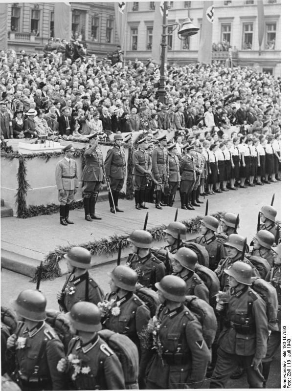 Berlin, Rückkehr vom Westfeldzug, Parade Berlin empfängt seine siegreichen Soldaten. Vorbeimarsch der Sieger vor der Ehrentribüne auf dem Pariser Platz. V.l.n.r.: Dr. Goebbels. General d. Artl. Fromm und der Kommandeur der Division. Fot. Zoll 18.7.40 6937-40 [Berlin, Pariser Platz.- Dr. Joseph Goebbels, Friedrich Fromm auf Ehrentribüne beim Vorbeimarsch siegreicher Truppen aus dem Frankreich-Feldzug] Abgebildete Personen: Fromm, Friedrich: Generaloberst, Ritterkreuz (RK), Heer, Deutschland (GND 118843338) Goebbels, Joseph: Reichsminister für Volksaufklärung und Propaganda, Gauleiter Berlin, Deutschland